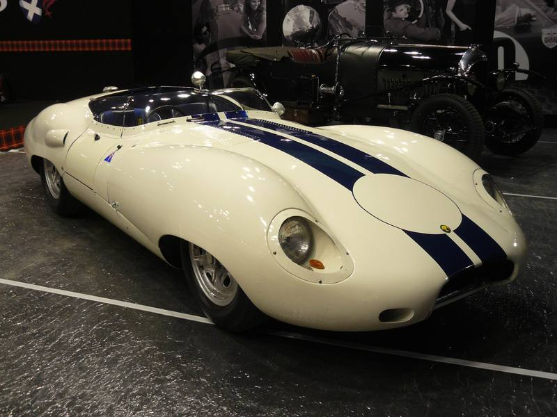 Retromobile 2012